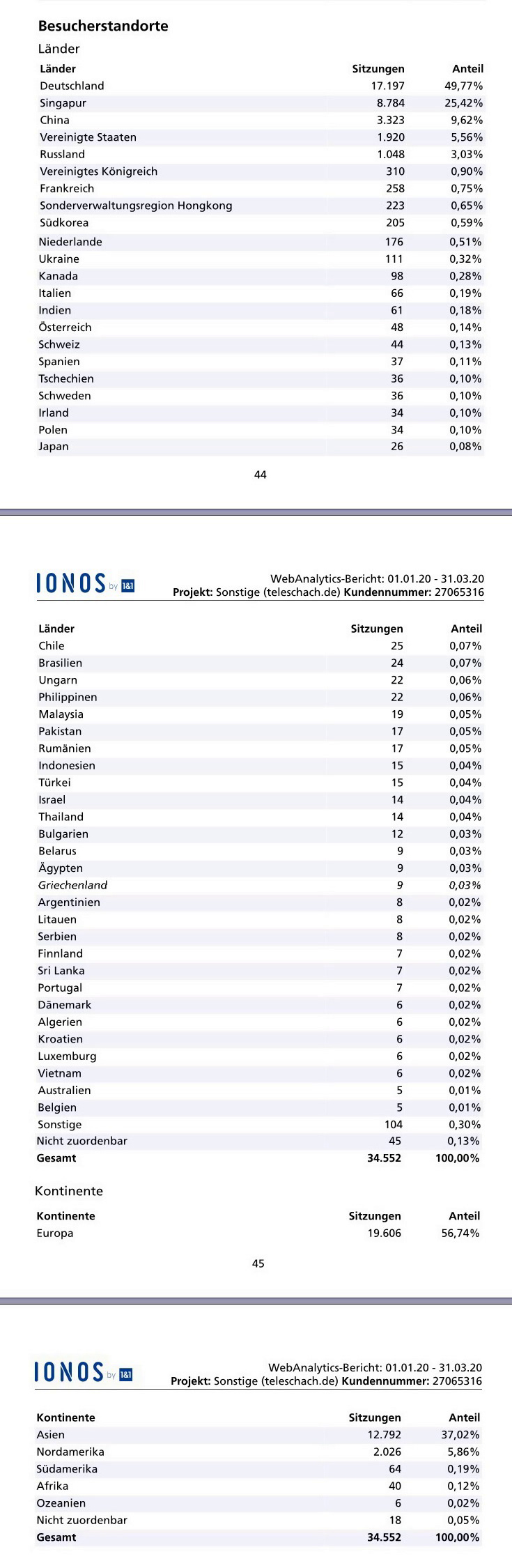 Besucherstatistik nach Herkunftsländern für das 1. Quartal 2020 des Webportals TeleSchach.